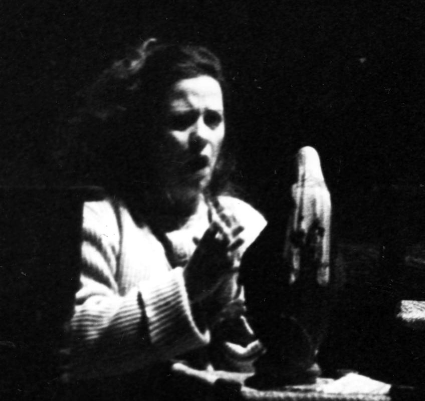 Jenufa